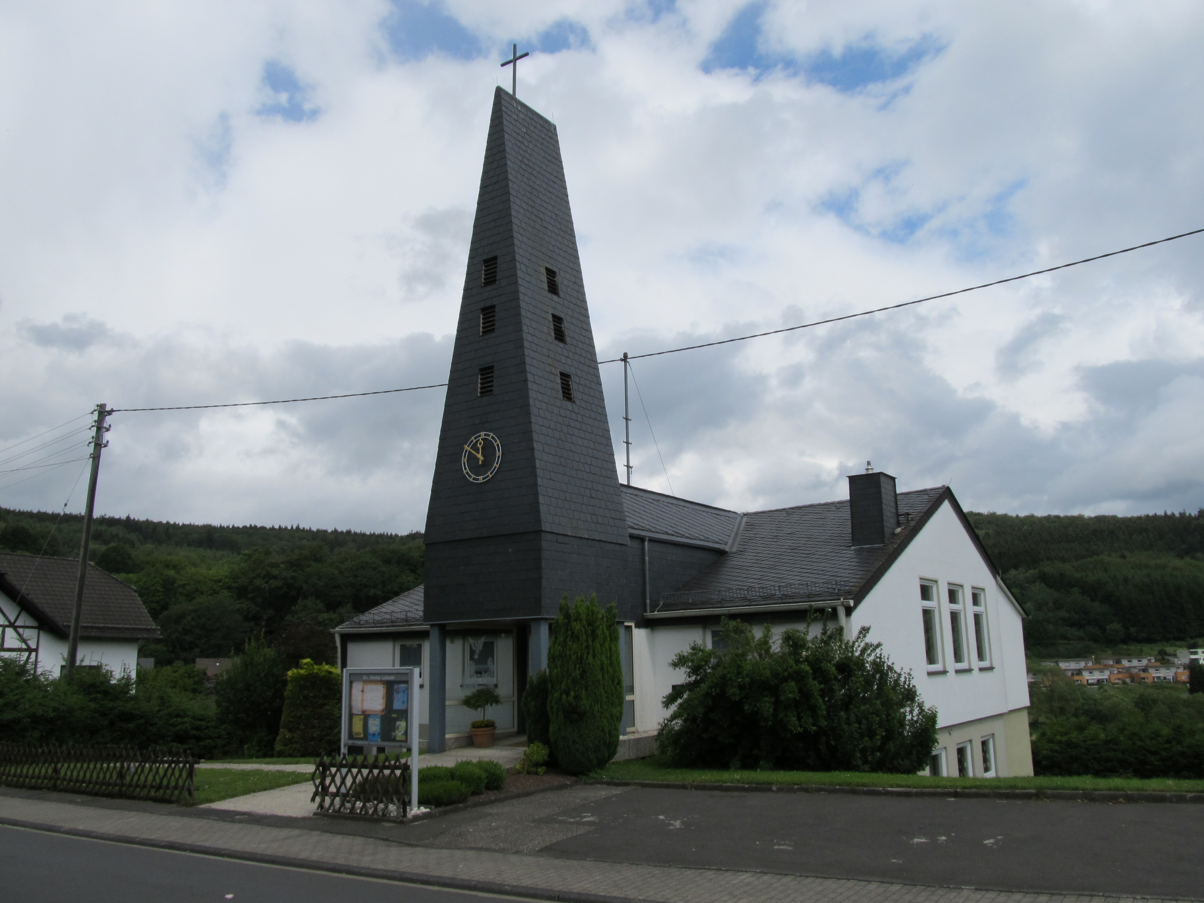 Evangelische Kirche in Burbach-Lützeln, Kreis Siegen-Wittgenstein, Nordrhein-Westfalen.